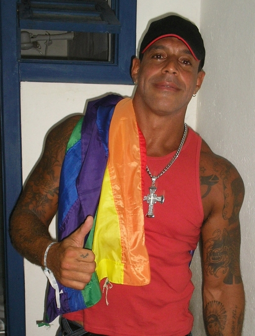 Alexandre Frota no Clube Planetário 11 no lançamento da G Magazine em 2006.